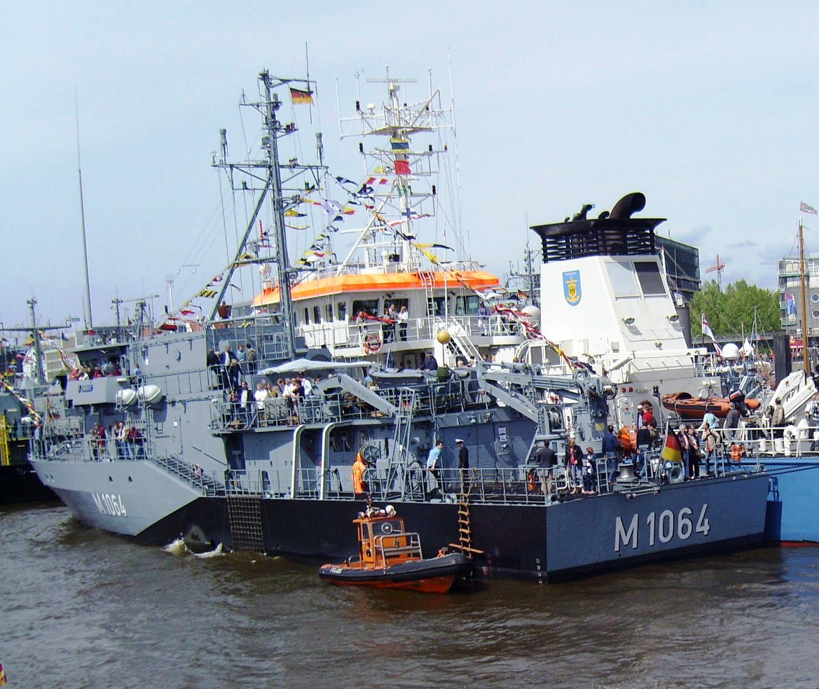 Bad Rappenau Minenjagdboot der Frankenthal Klasse